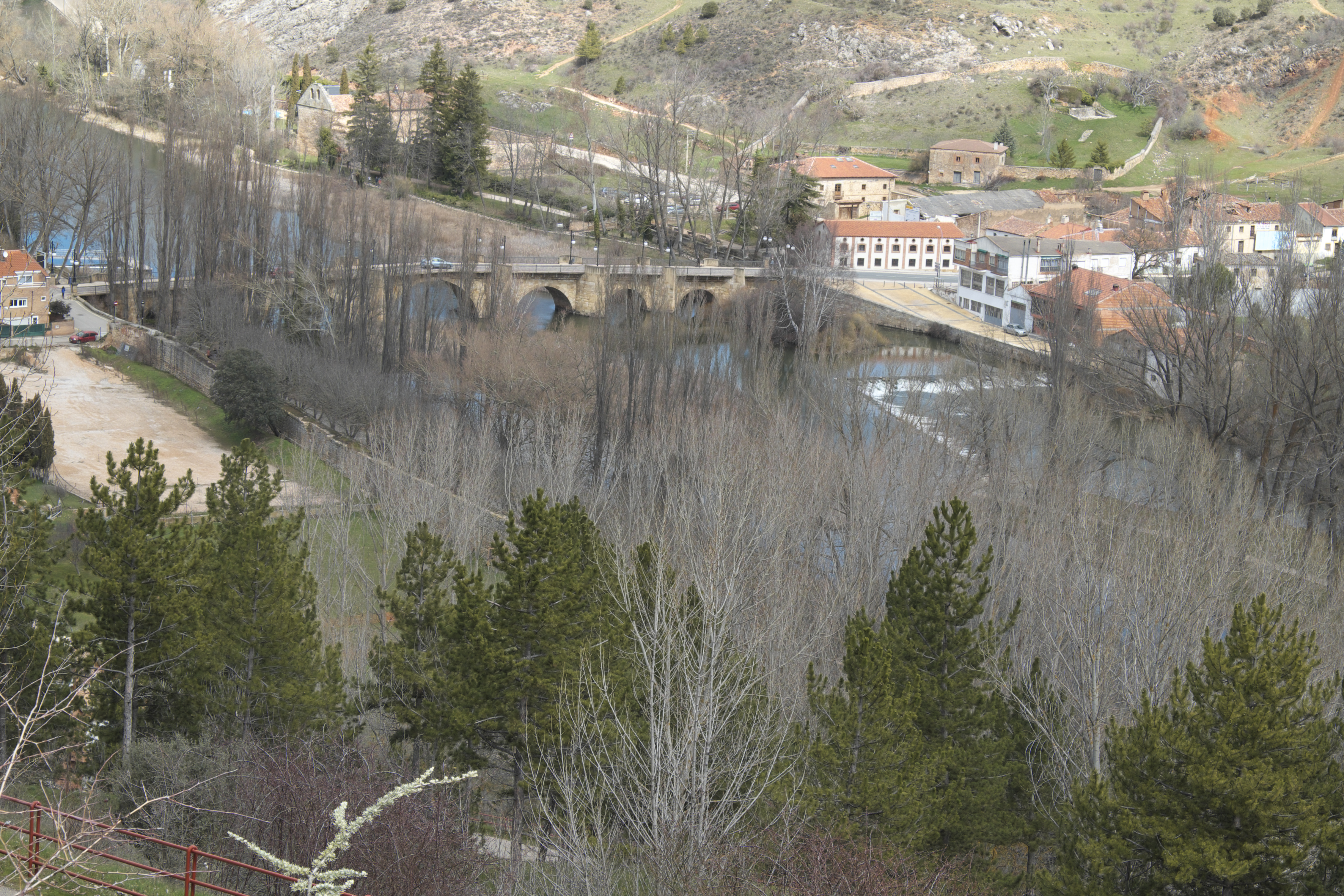 Puente de Piedra in Soria (Kastilien-León/Spanien)